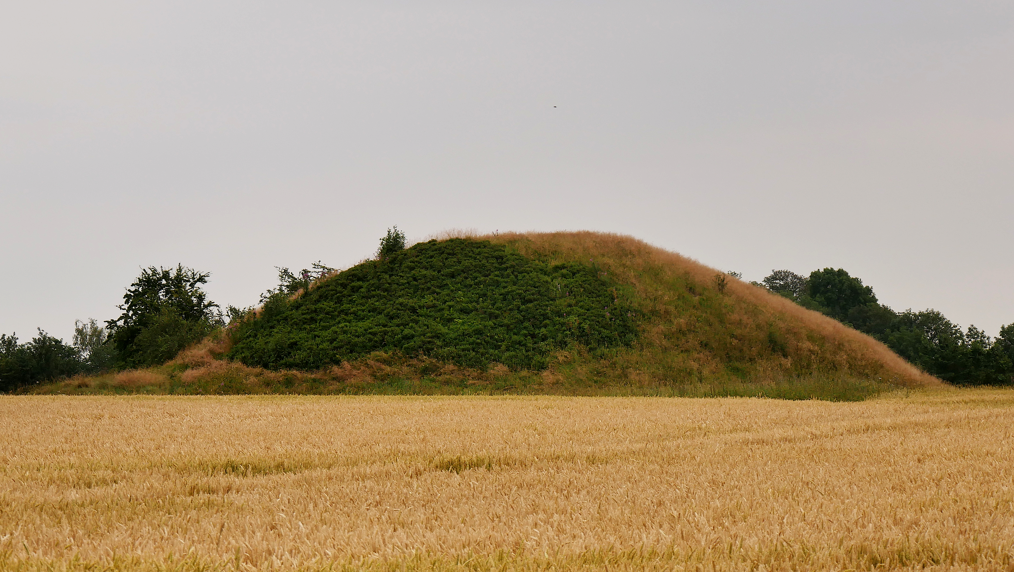 Ganggräber von Snæbum - Grabhügel Snibhøj